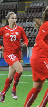 a_81_0976